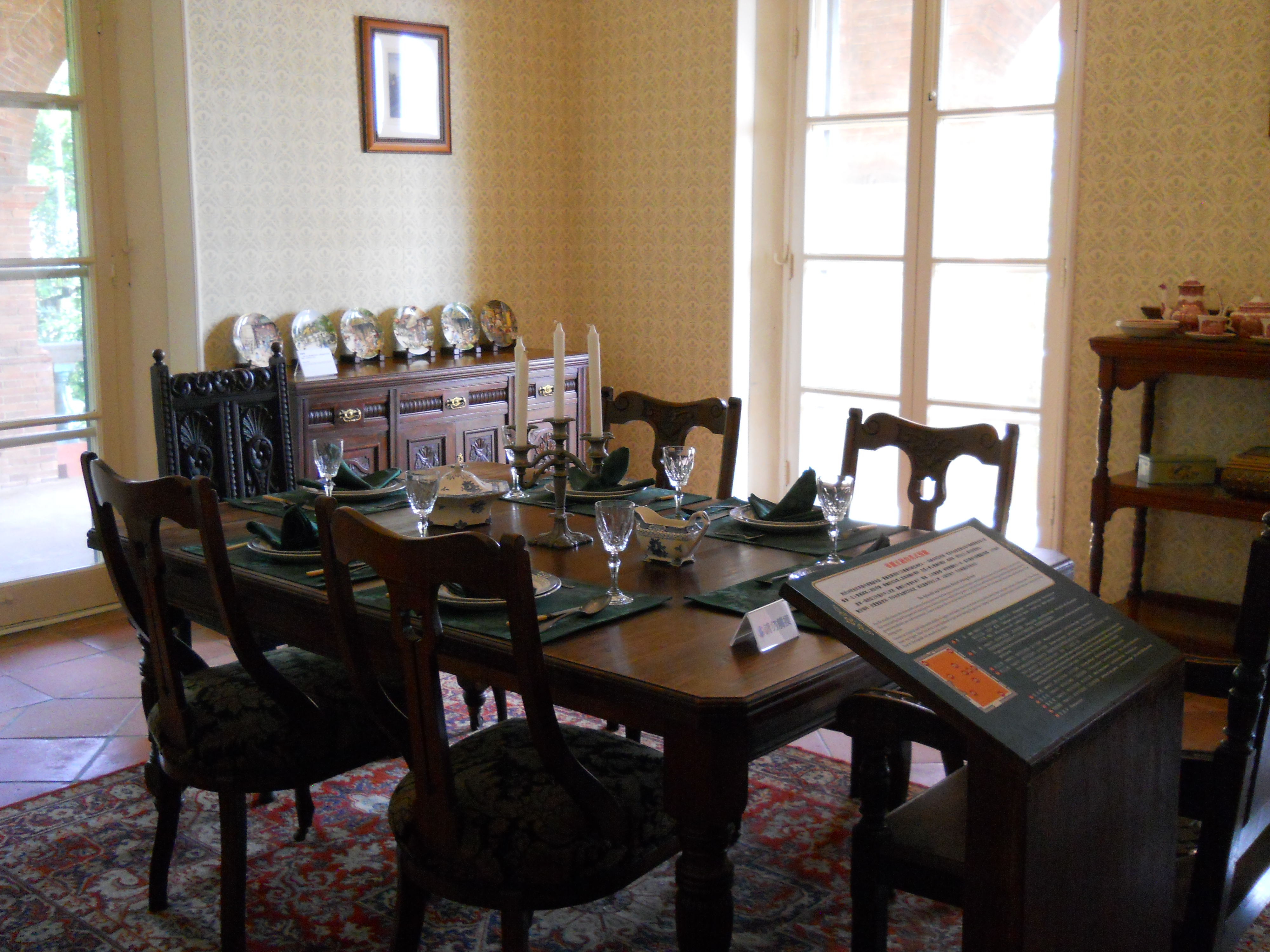 淡水紅毛城